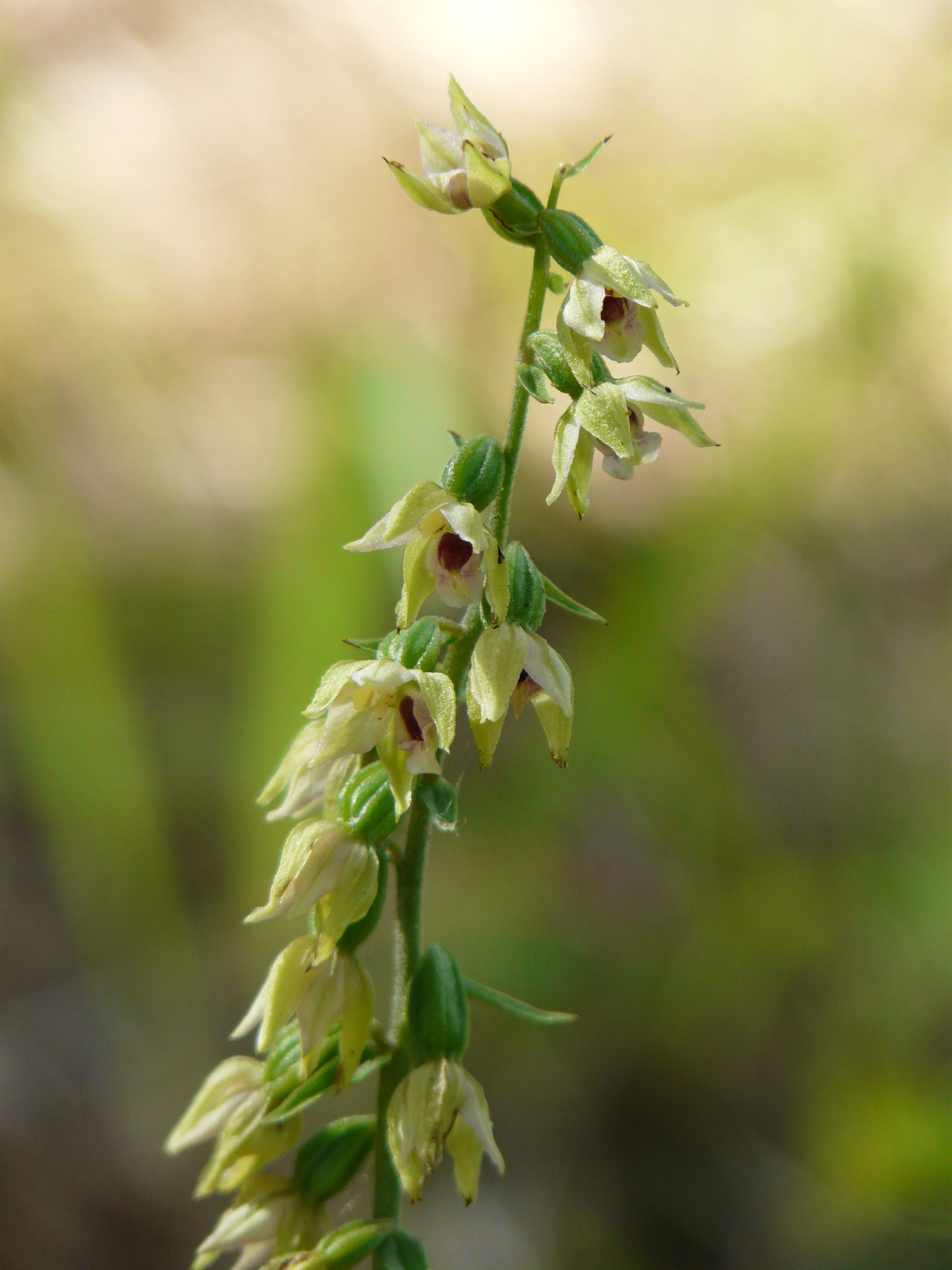 Fleurs d'Épipactis de Müller (Epipactis muelleri), Trélissac, Dordogne, France